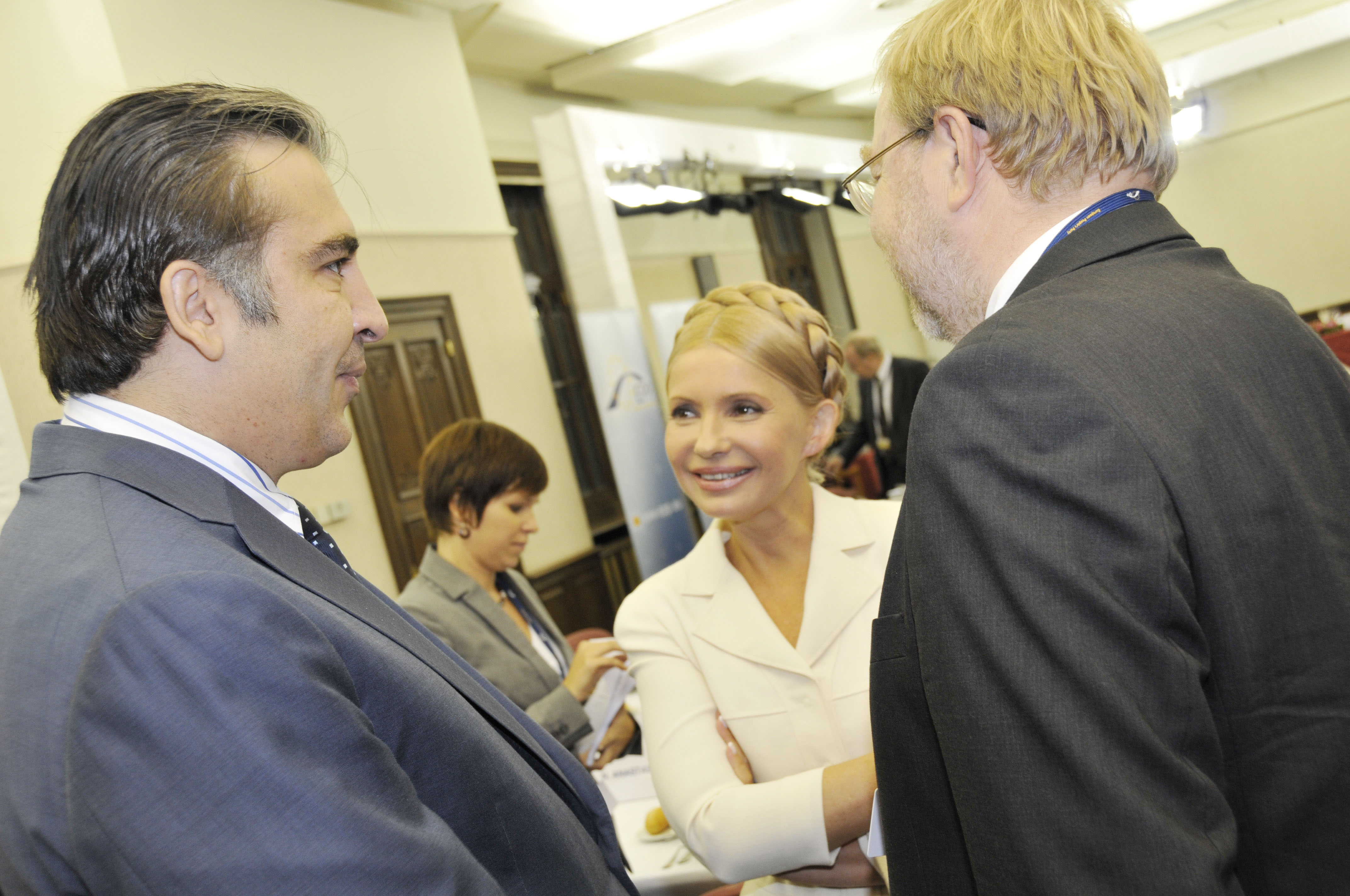 EPP Summit September 2010